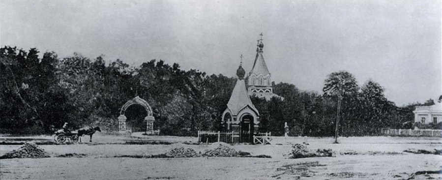 Александровское убежище в Москве. Вид с Петербургского шоссе.